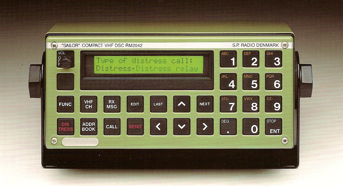 descriptionémetteurs récepteurs SMDSM bande VHF marine d'appel sélectif numérique sur canal 70, fréquence: 156,525 MHz